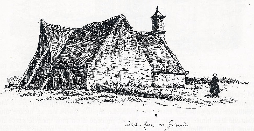 Guimaëc : la chapelle Sainte-Rose (dessin de Louis Le Guennec, vers 1910)